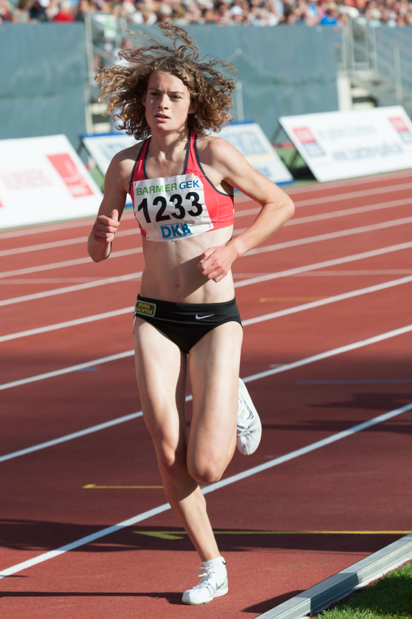 Deutsche Leichtathletik-Meisterschaften 2015: Alina Reh, TSV Erbach